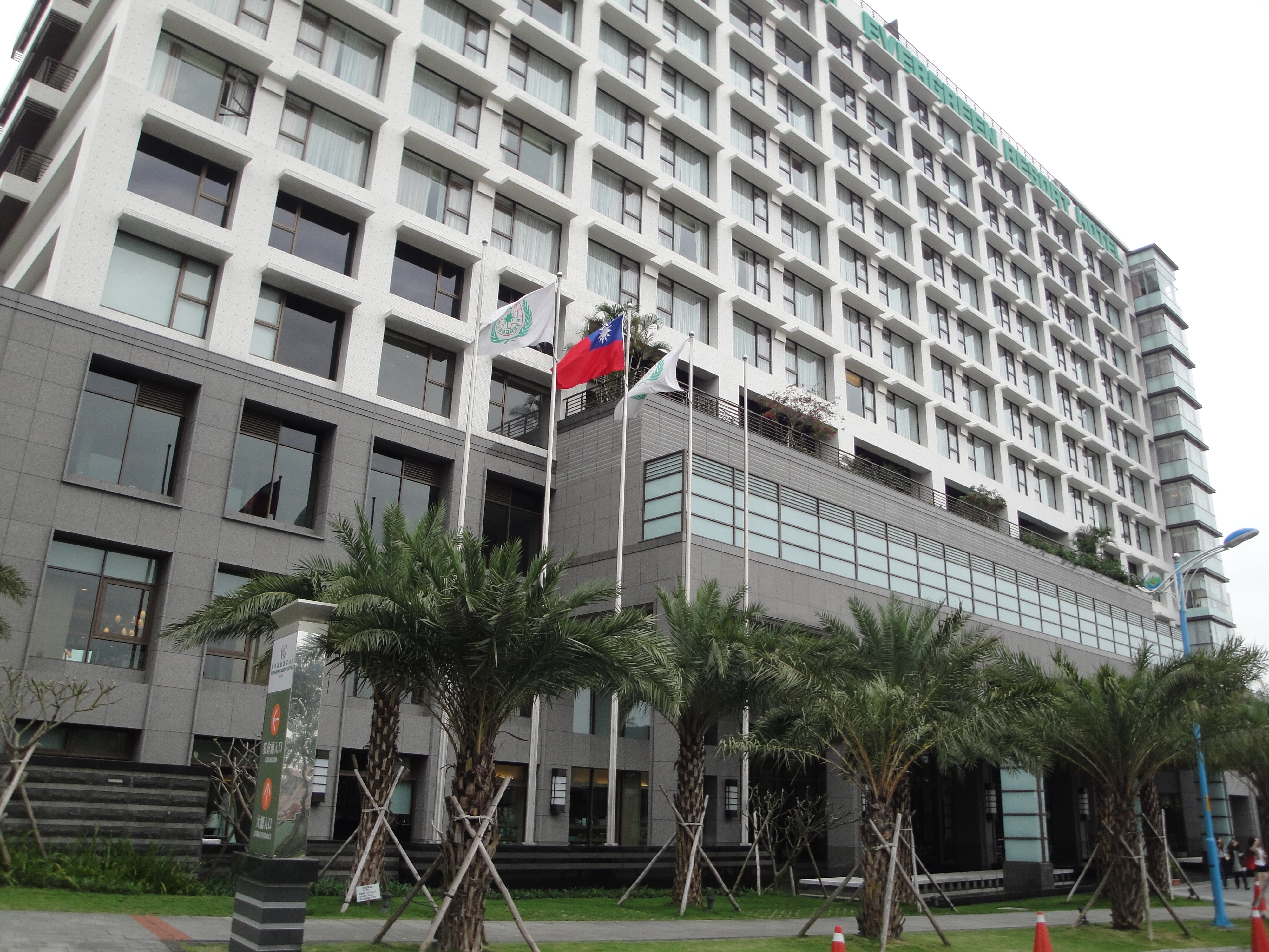 中文（台灣）: 長榮鳳凰酒店（礁溪），位於宜蘭縣礁溪鄉健康路77號，旗桿升起中華民國國旗與長榮集團旗。